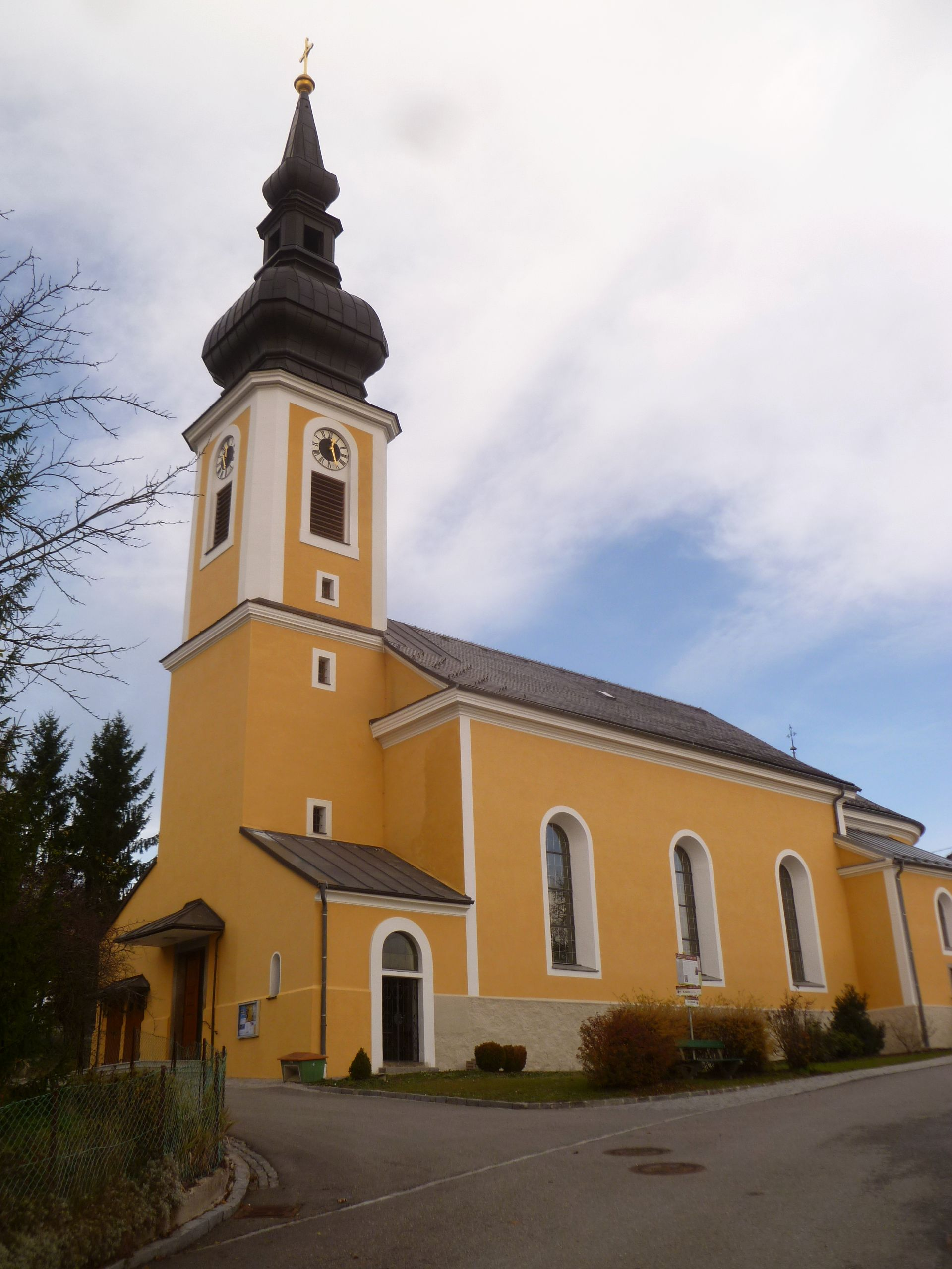 Kath. Pfarrkirche hl. Maximilian